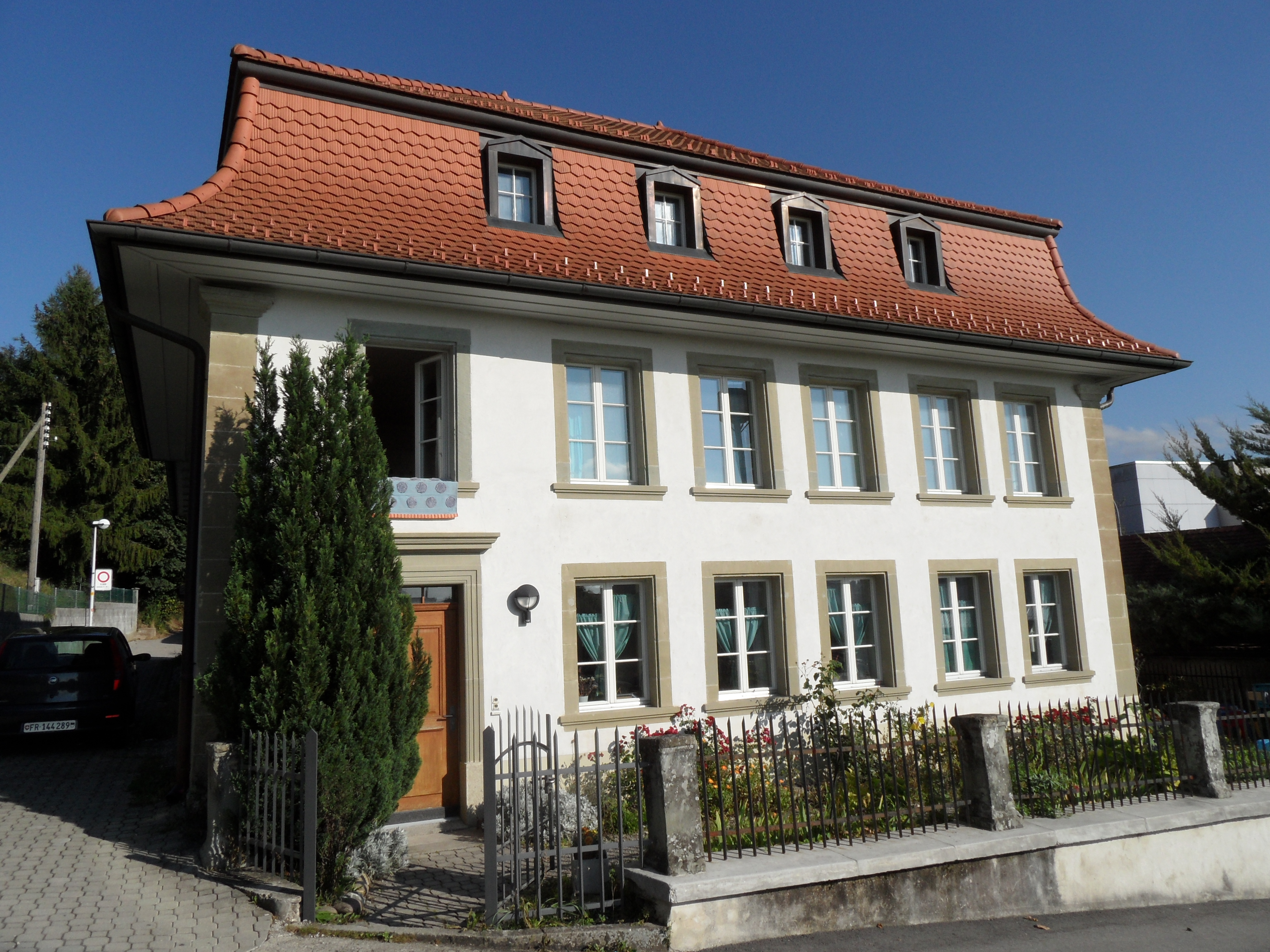 Maison patricienne avec toit mansardé à Marly, canton de Fribourg en Suisse.